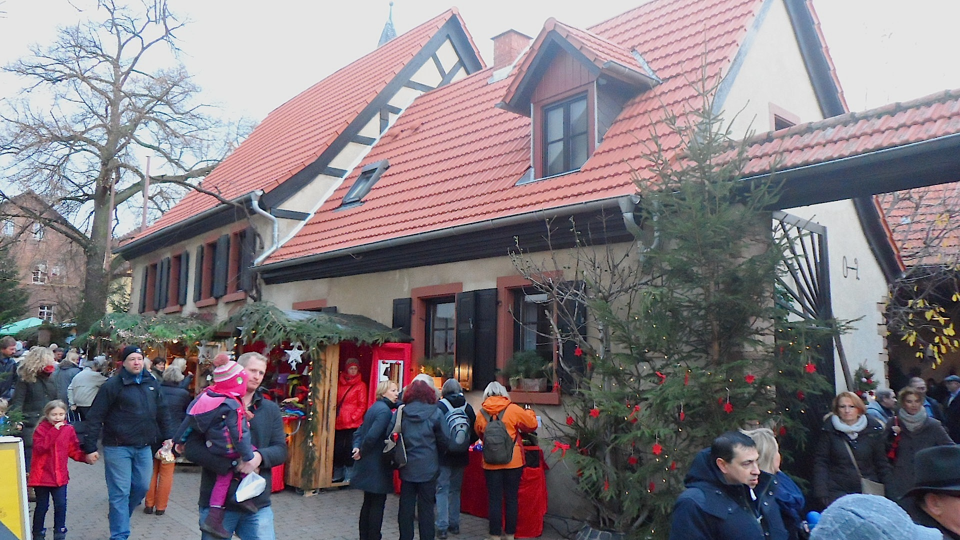 Bobenheim am Berg, Belzenickelmarkt 2013, erstes Adventwochenende